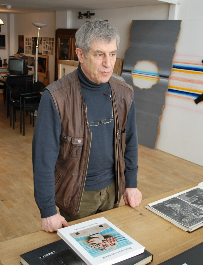 Владимир Янкилевский в своей московской мастерской. Март 2010 года.